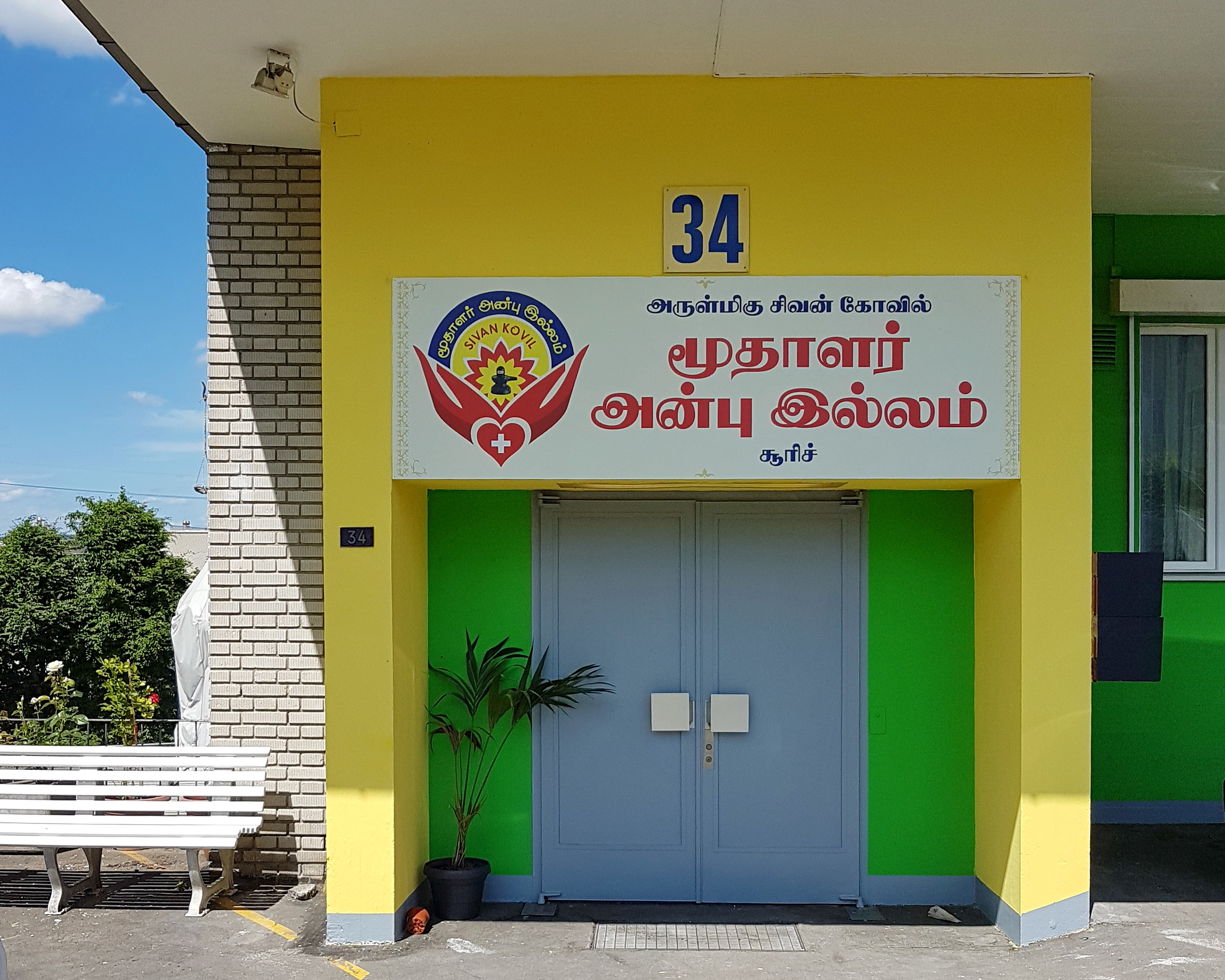 Arulmihu Sivan Temple in Zürich-Glattbrugg (Switzerland)